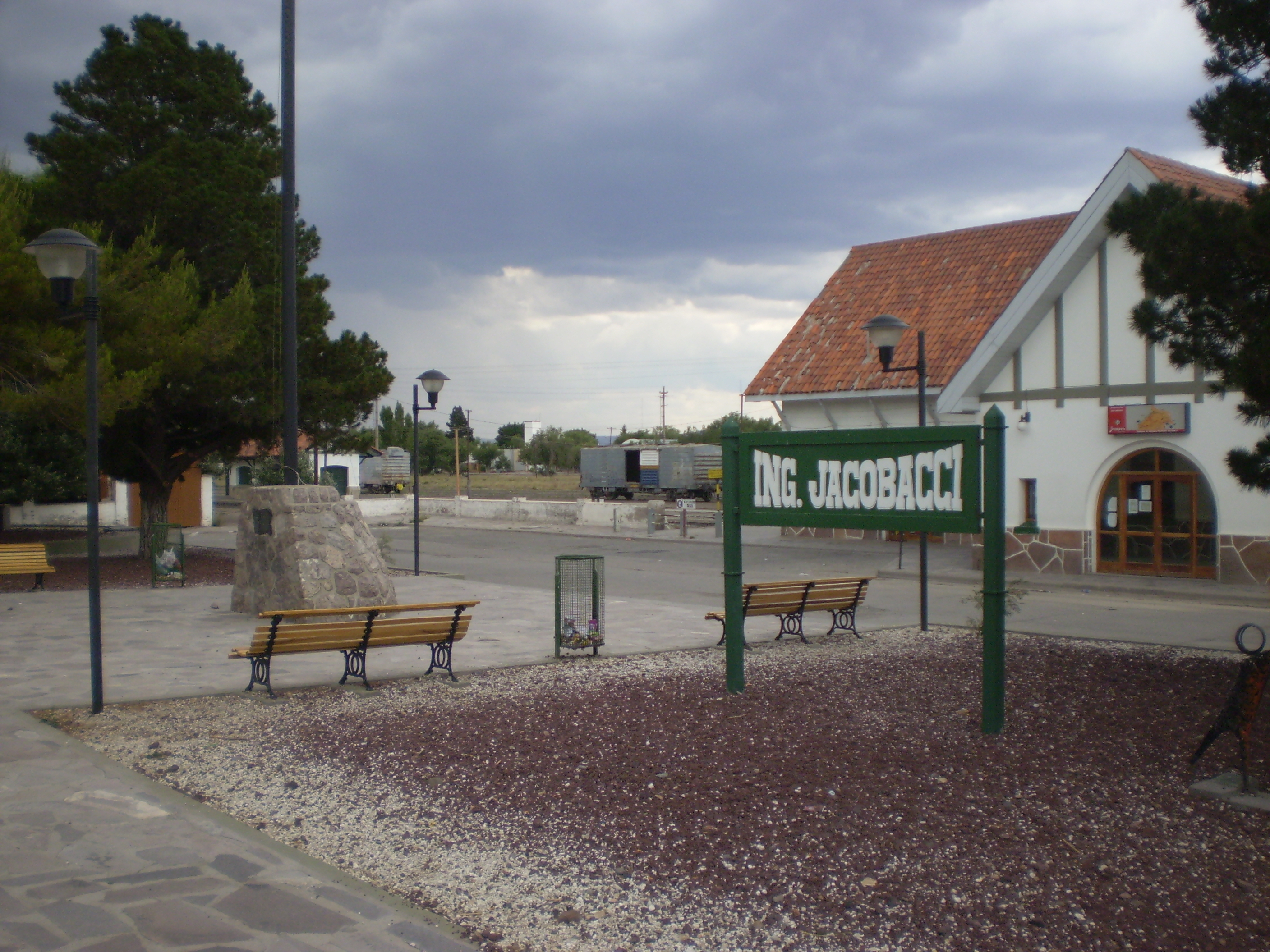 Estación del ferrocarril de Ingeniero Jacobacci, Rio Negro, Argentina